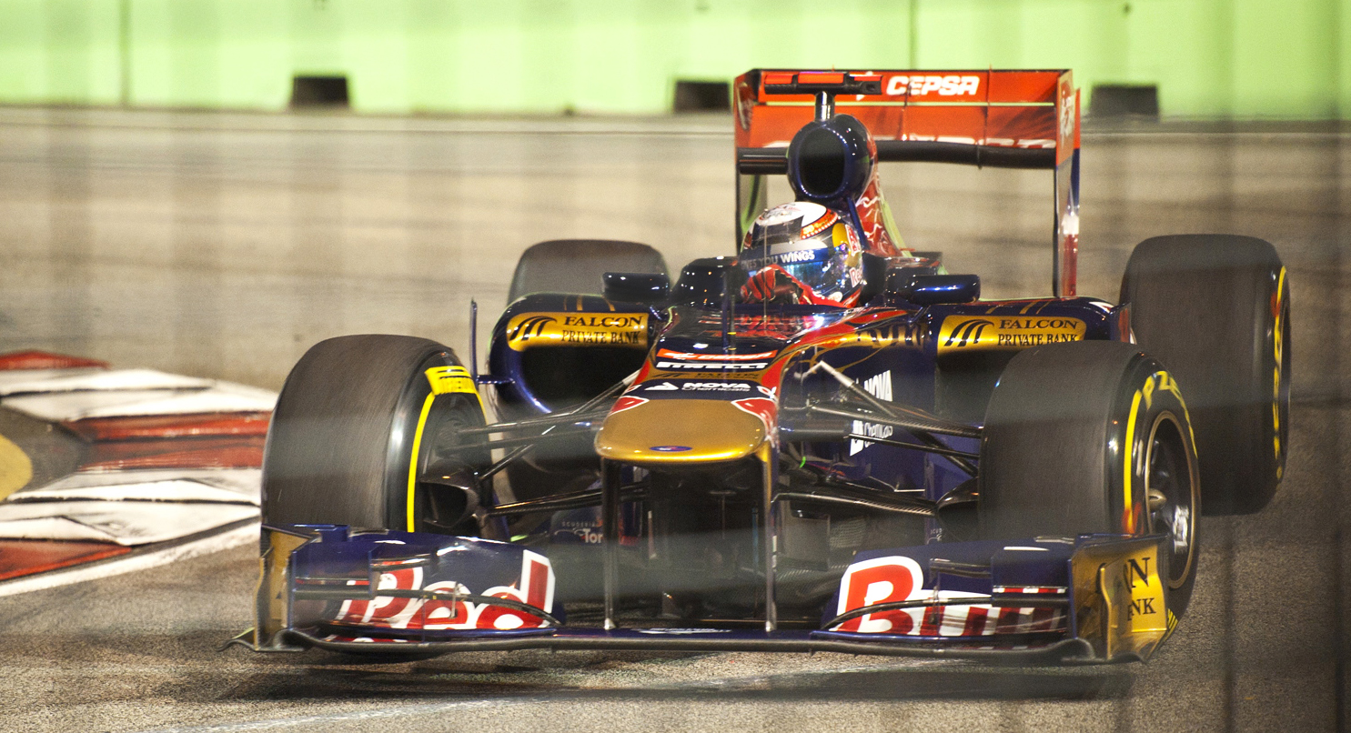 Photography By : Dhonsky